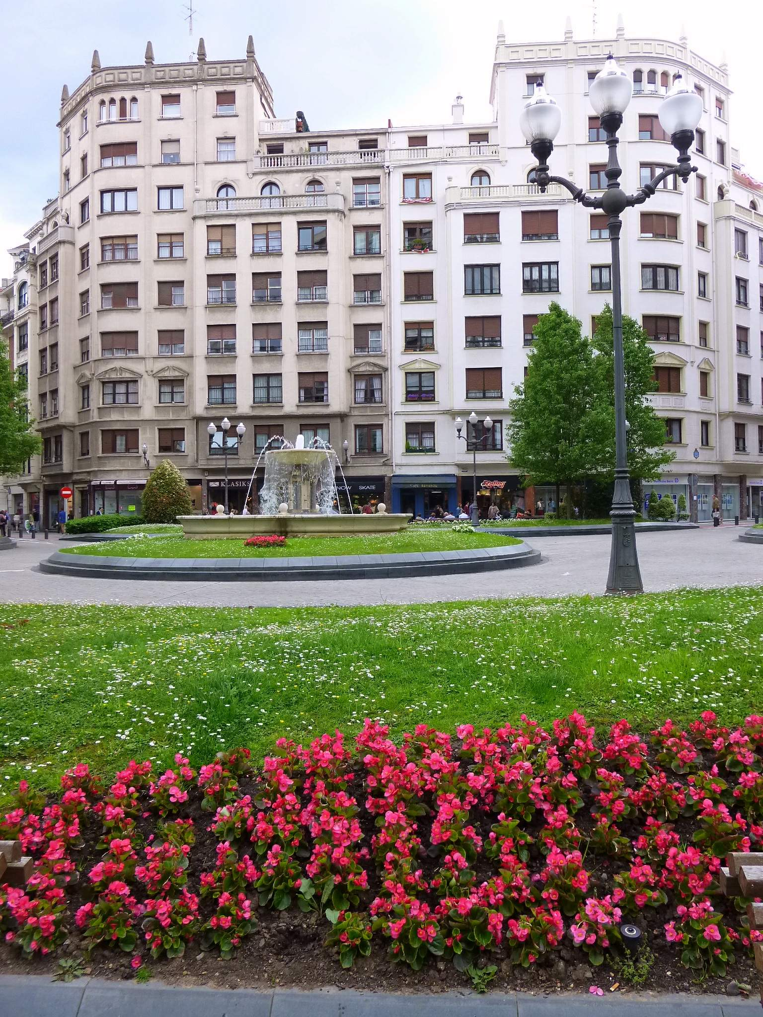 Plaza de Emilio Campuzano (Bilbao)